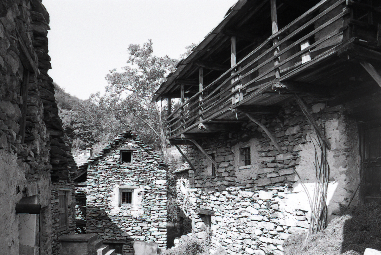 Servizio fotografico : Pieve Vergonte, 1982 / Paolo Monti. - Strisce: 7, Fotogrammi complessivi: 37 : Negativo b/n, gelatina bromuro d'argento/ pellicola ; 35 mm. - ((Sul portanegativi: N[I]K[MA]T FP4. - Occasione: Documentazione per la pubblicazione: Alberti Luigi, Rainaldi Giancesare, Rizzi Enrico (a cura di), "Elogio del Lago d'Orta", Anzola d'Ossola-Valstrona, Fondazione arch. Enrico Monti-Lo Strona, 1983. - Fonte: Agenda di Paolo Monti: Nikon Leika 3001-/ Monti 1978 (1978-1982), presso Archivio Paolo Monti